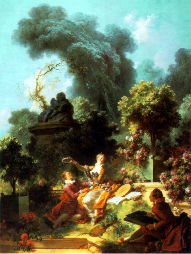 Pintura de Fragonard